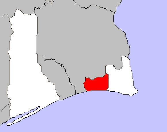 Localização da freguesia de Monte Gordo